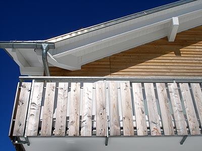 Holzhaus